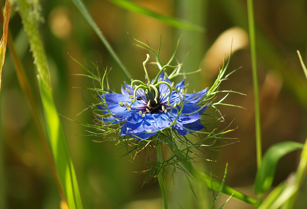 Jungfer im Grünen (Nigella damascena)